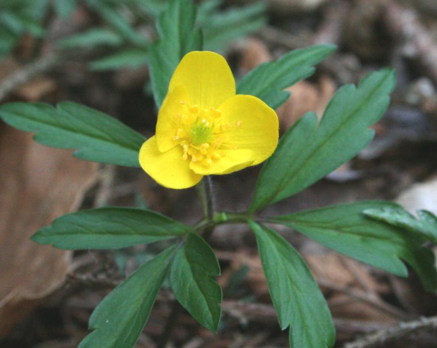 Anemone ranunculoides